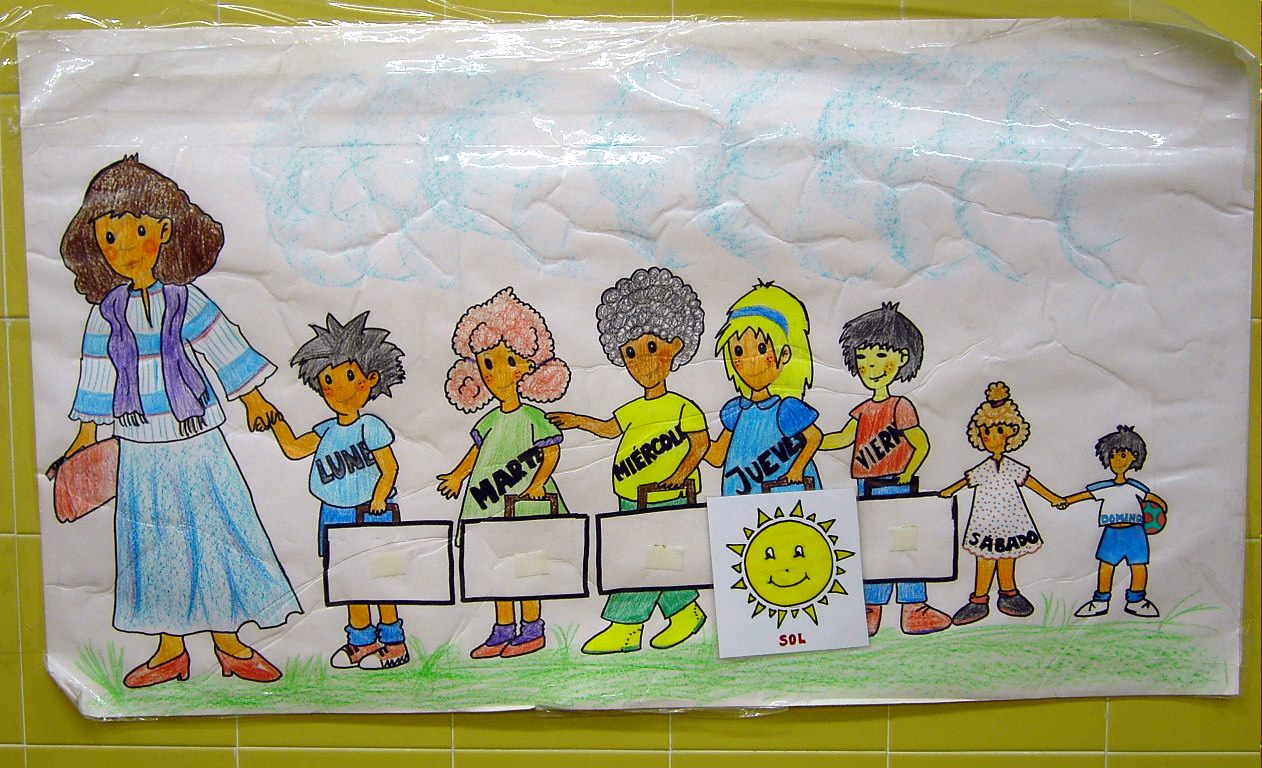 Rutinas en Educación Infantil